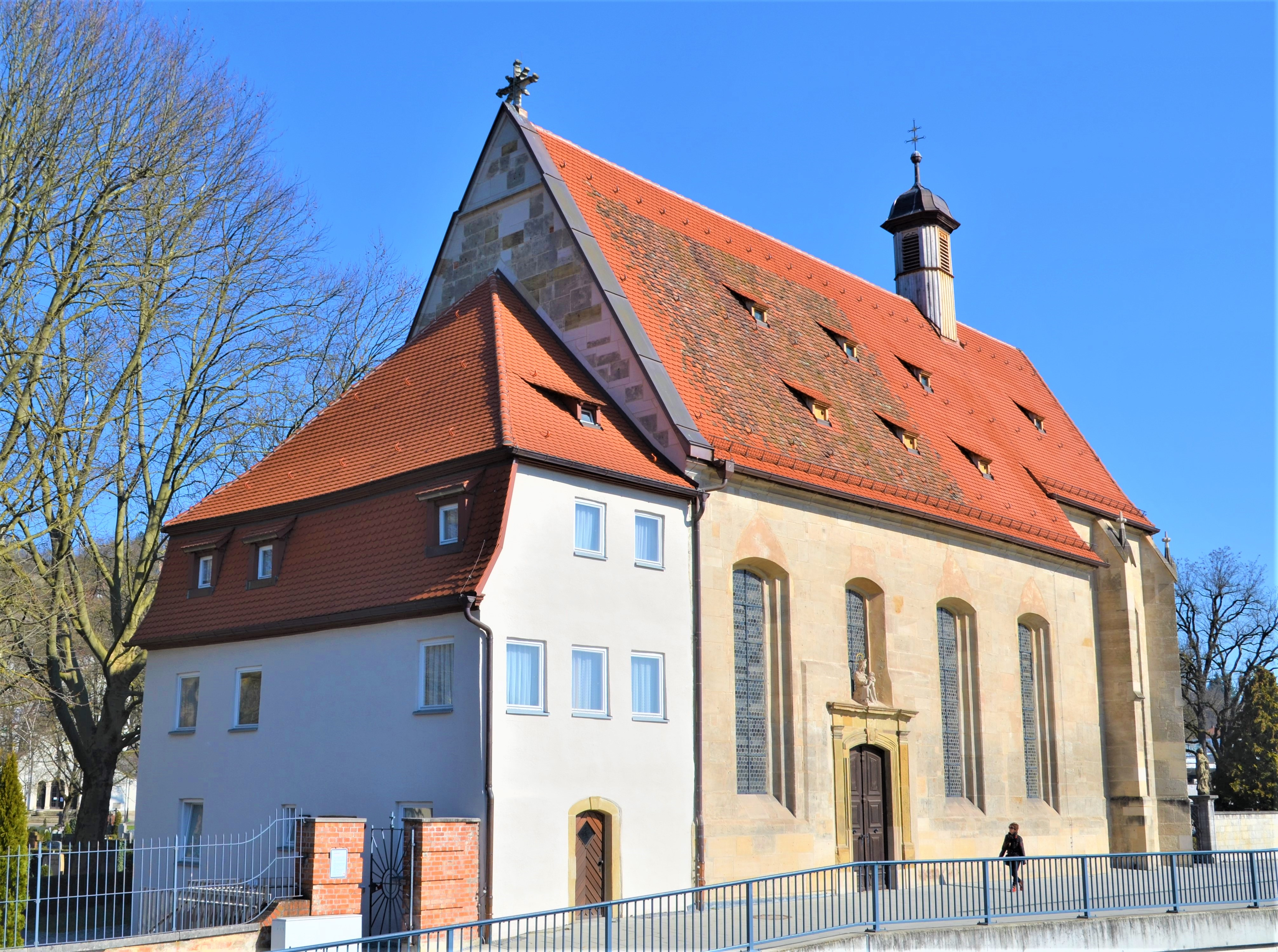 Leonhardskirche mit angebautem Mesnerhaus in Schwäbisch Gmünd von Südwest